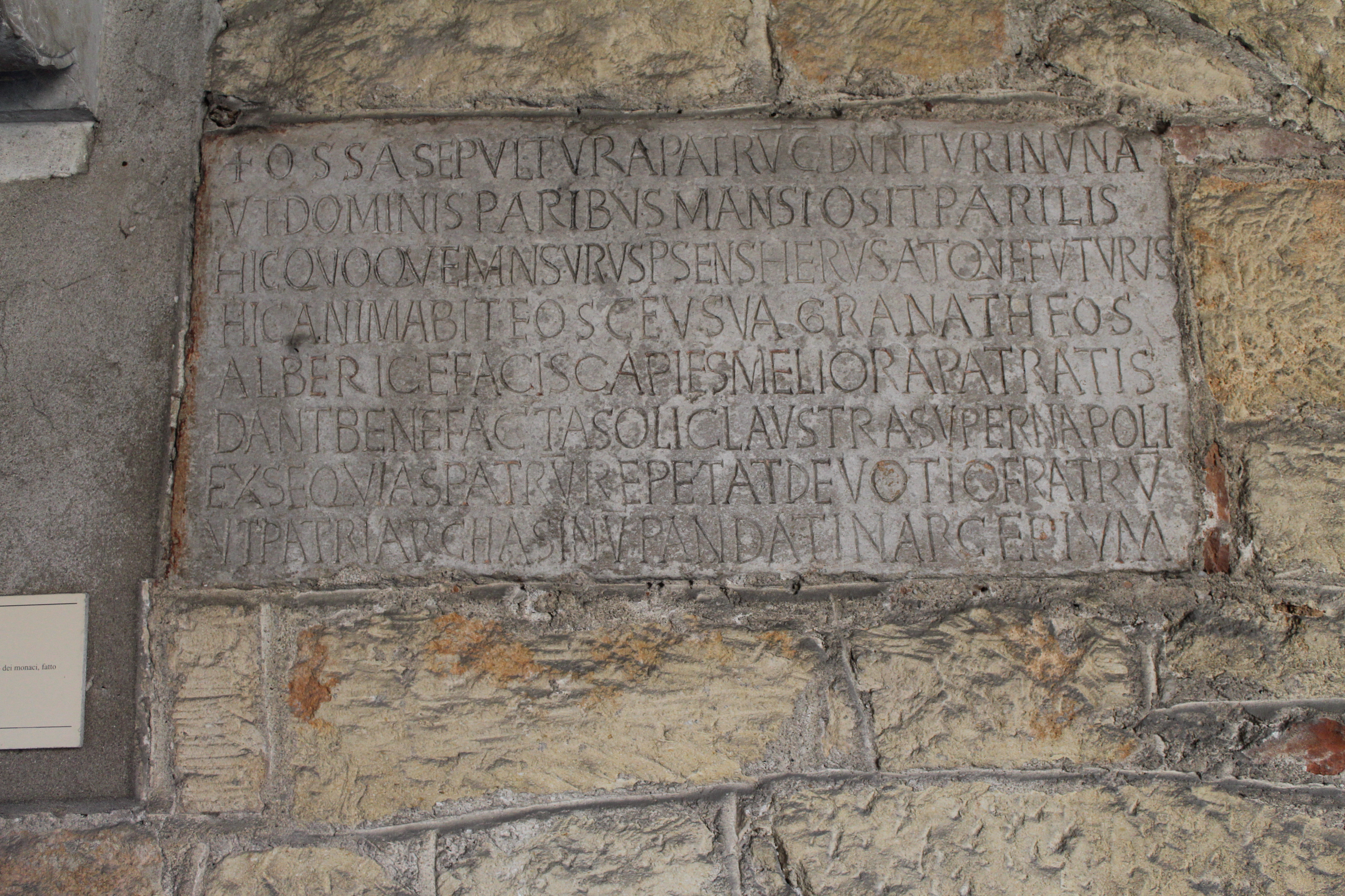 Iscrizione che ricorda la presenza della tomba dei monaci nel chiostro della basilica di San Zeno a Verona